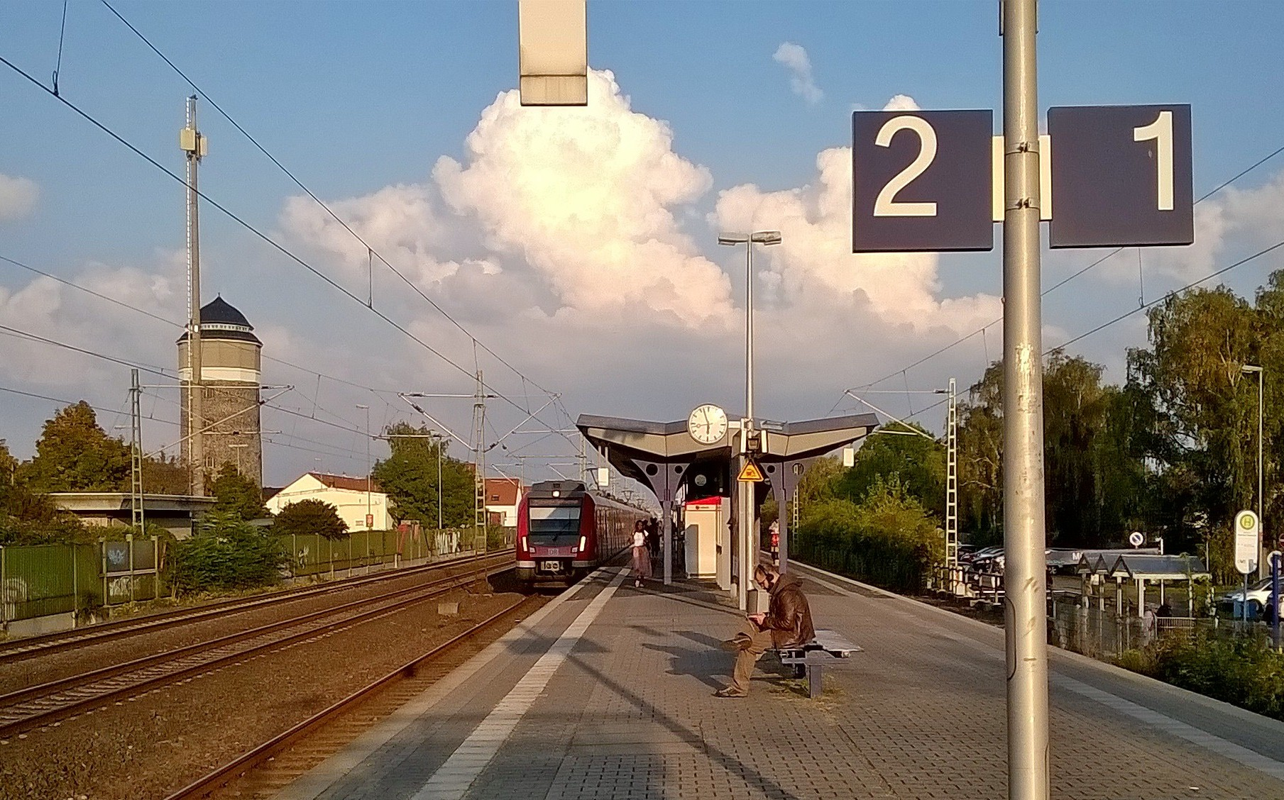 Bahnsteig des Bahnhofs Mühlheim (Main) mit Blick Richtung Hanau. Zug der Linie S8 einfahrend auf Gleis 2.